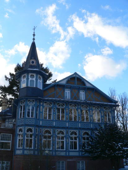 Villa Lilly, 1. Hauptgebäude in der Parkanlage Villa Lilly